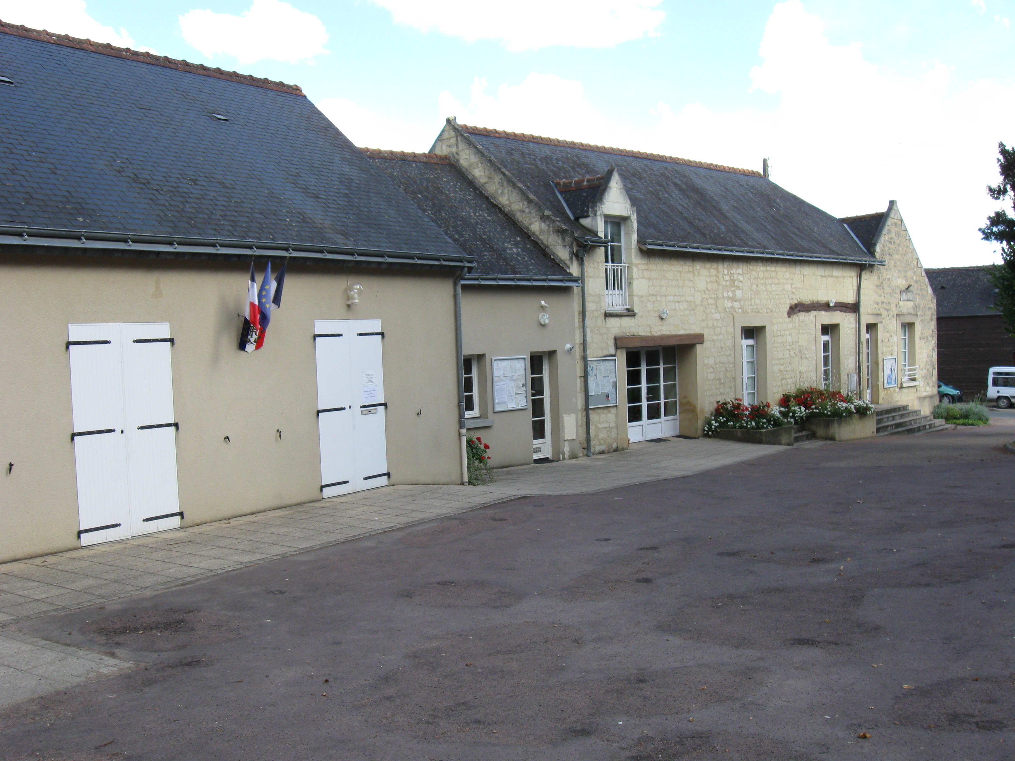 Mairie de La Roche-Clermault. (Indre-et-Loire, région Centre-Val de Loire).